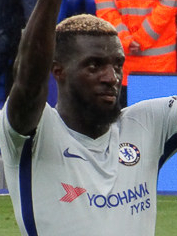 Tiemoué Bakayoko 2017